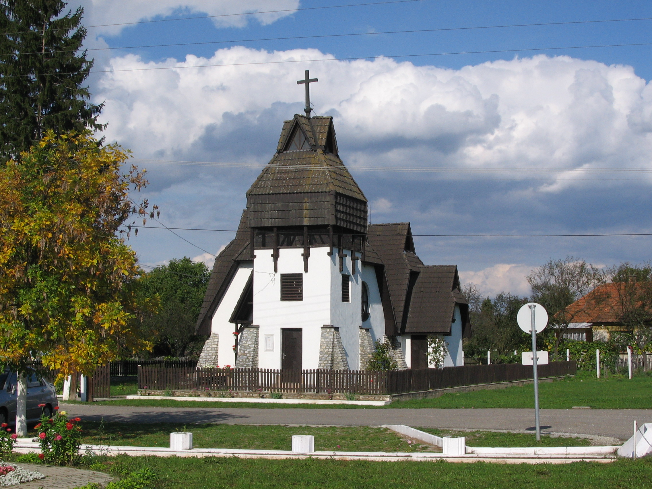 Kármelhegyi Boldogasszony római katolikus templom, Martonyi